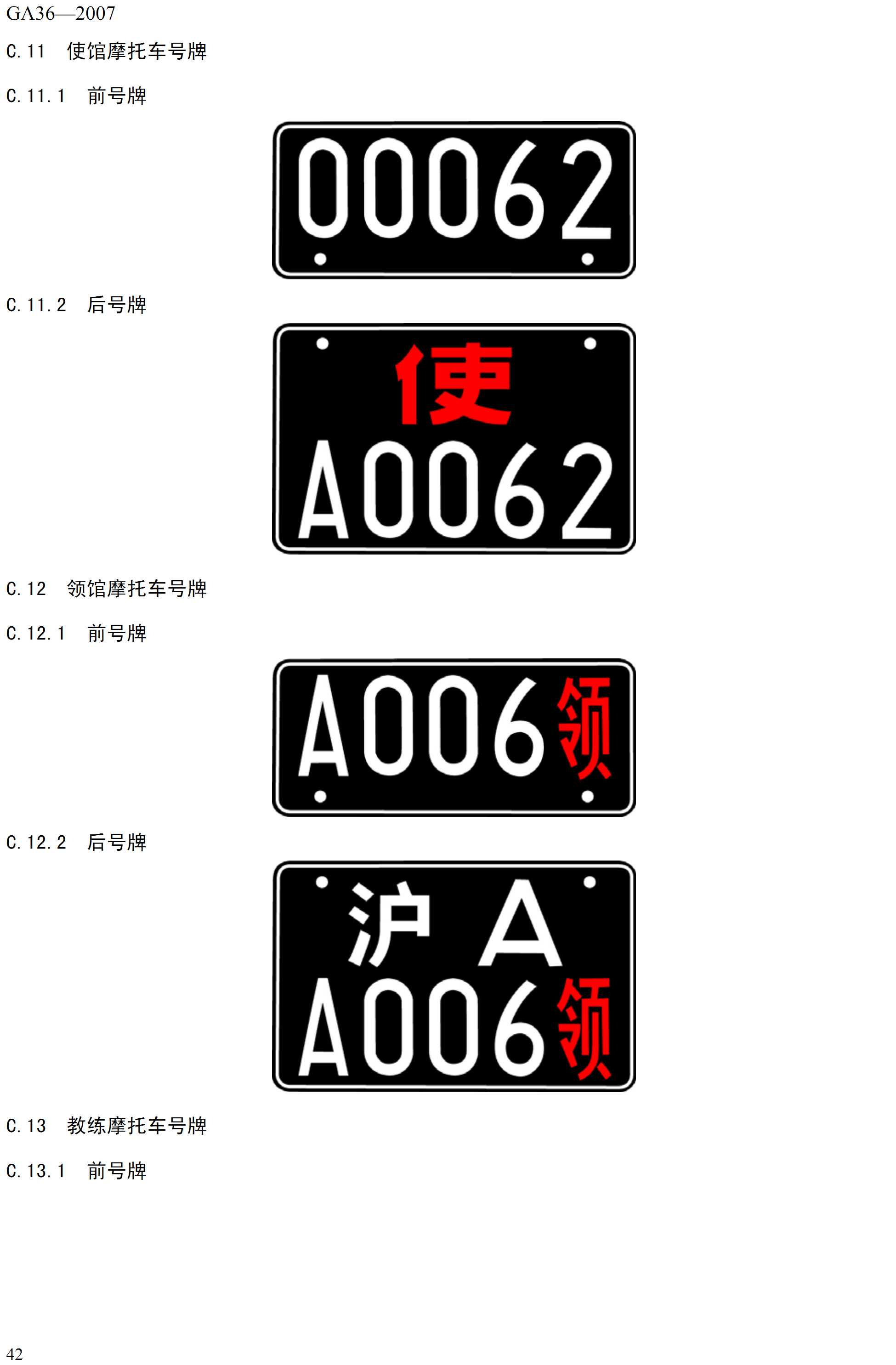 中文（中国大陆）: 中华人民共和国机动车号牌示意图(5)